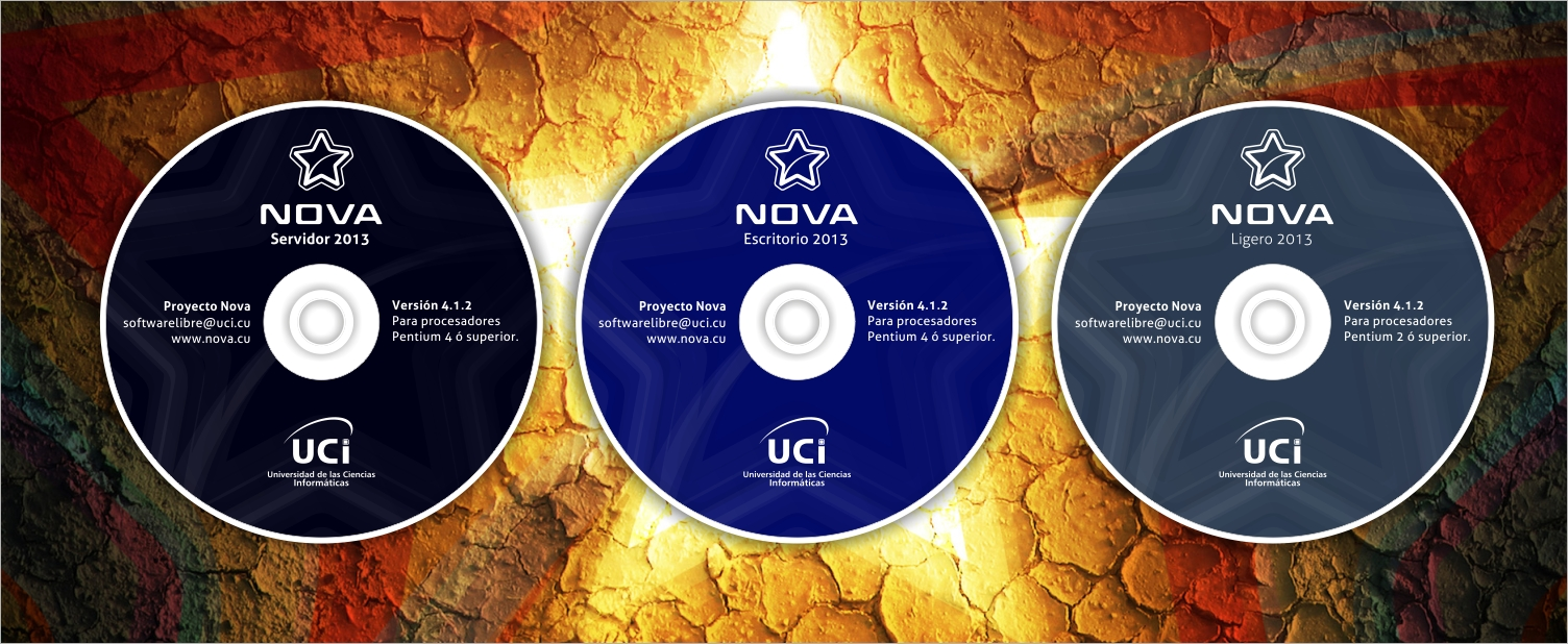 Label der DVD-Version von Nova 4